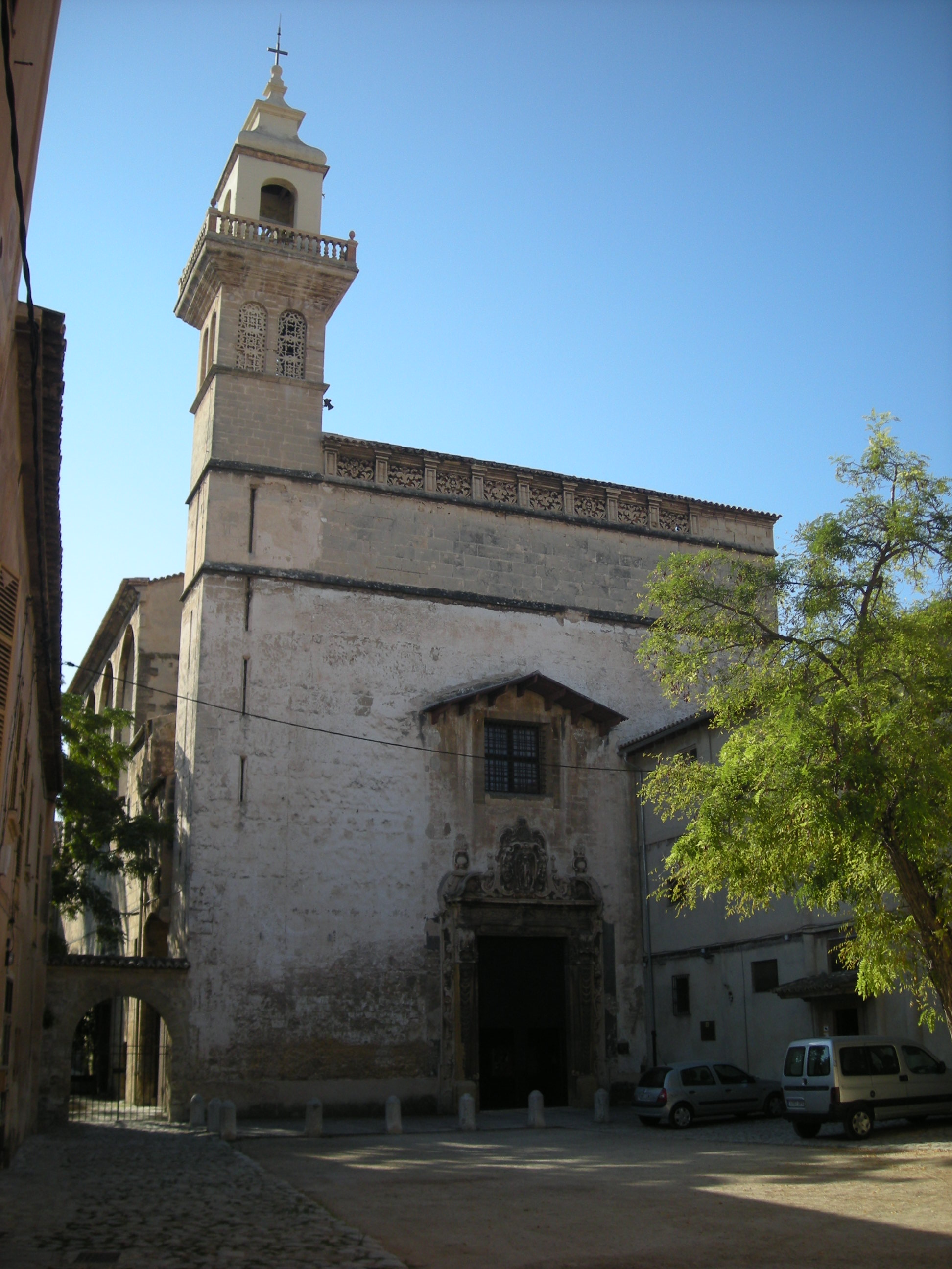 Església de Santa Clara. Palma. Mallorca